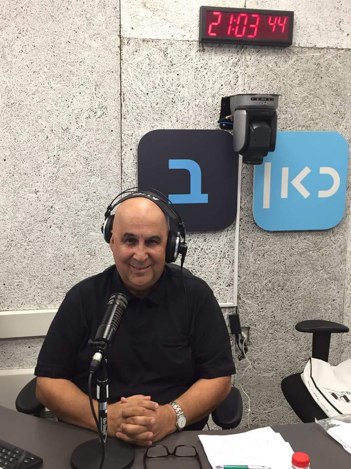 אליהוא בן און באולפן הקשר הישראלי